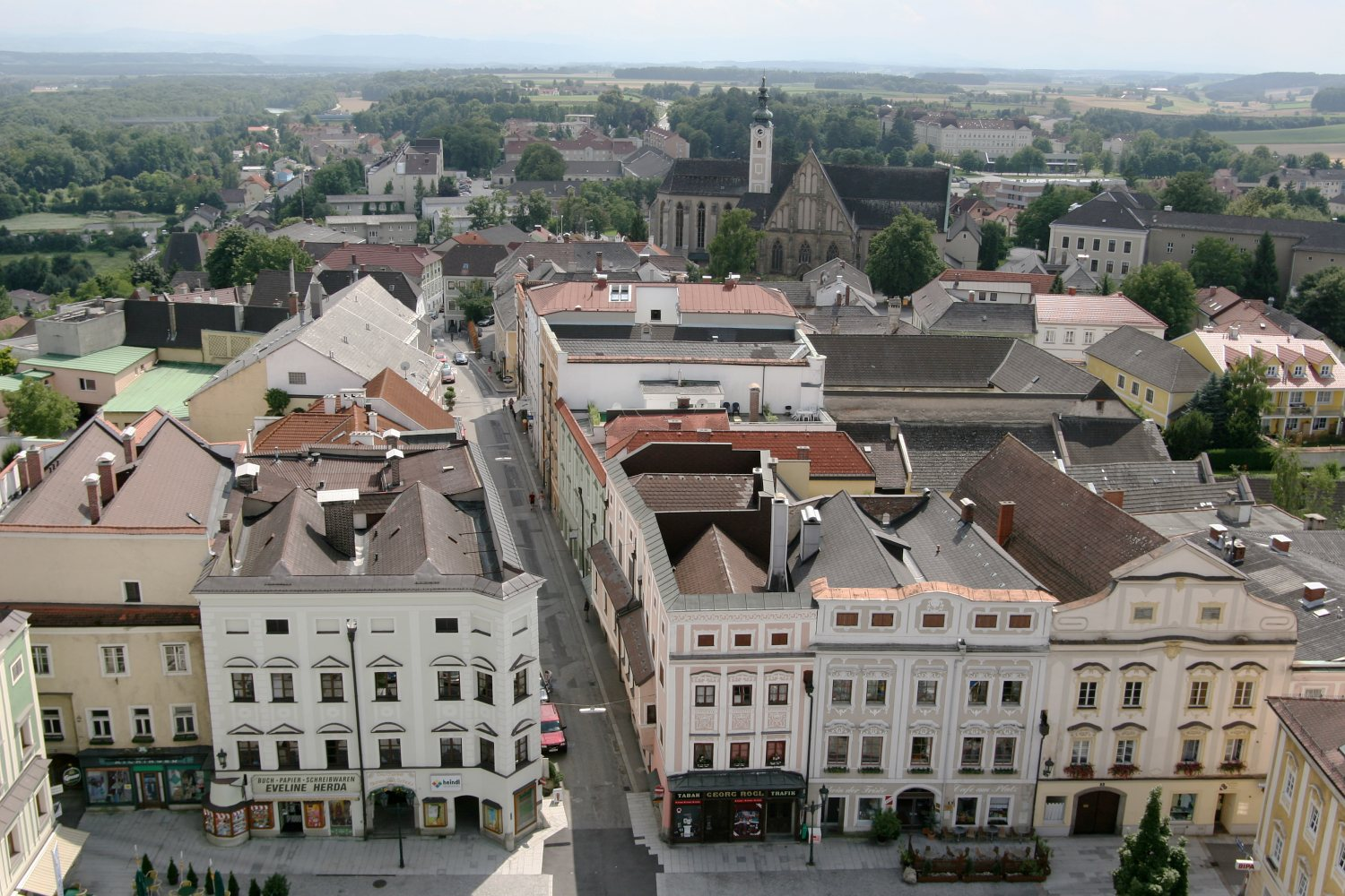 Description: Southern view of Enns in Upper Austria, image taken from city tower Historische Altstadt von Enns, Oberösterreich, Ansicht vom Stadtturm gegen Süden own image, taken July 24, 2005 Photographer: Herbert Ortner, Vienna, Austria